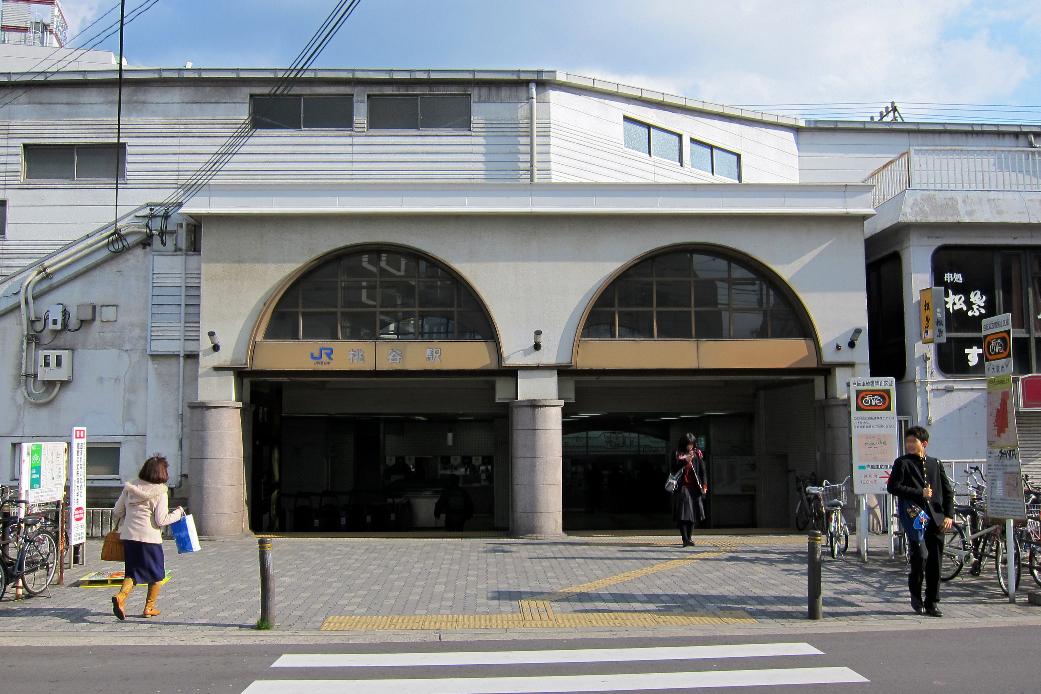 Momodani Station (JR桃谷駅) at Osaka City, Japan.